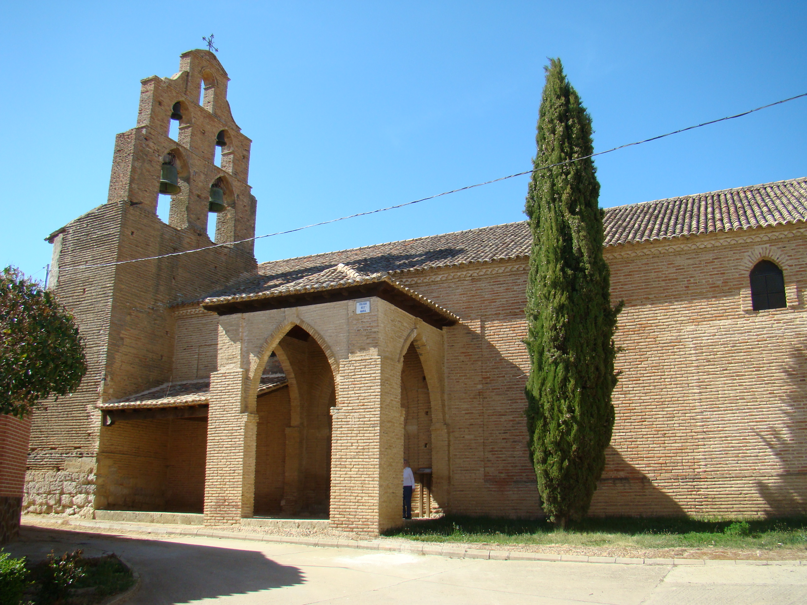 Iglesia de Santa María del Castillo en la localidad de Cuenca de Campos, provincia de Valladolid, España. Es una construcción del siglo XIV en estilo gótico-mudéjar. Fue restaurada por un particular y se ha convertido en museo con exposiciones temporales.